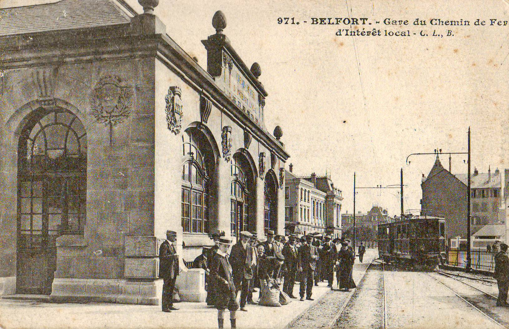 Carte postale ancienne éditée par CLB, n°971 : BELFORT - Gare du Chemin de fer d'intérêt local